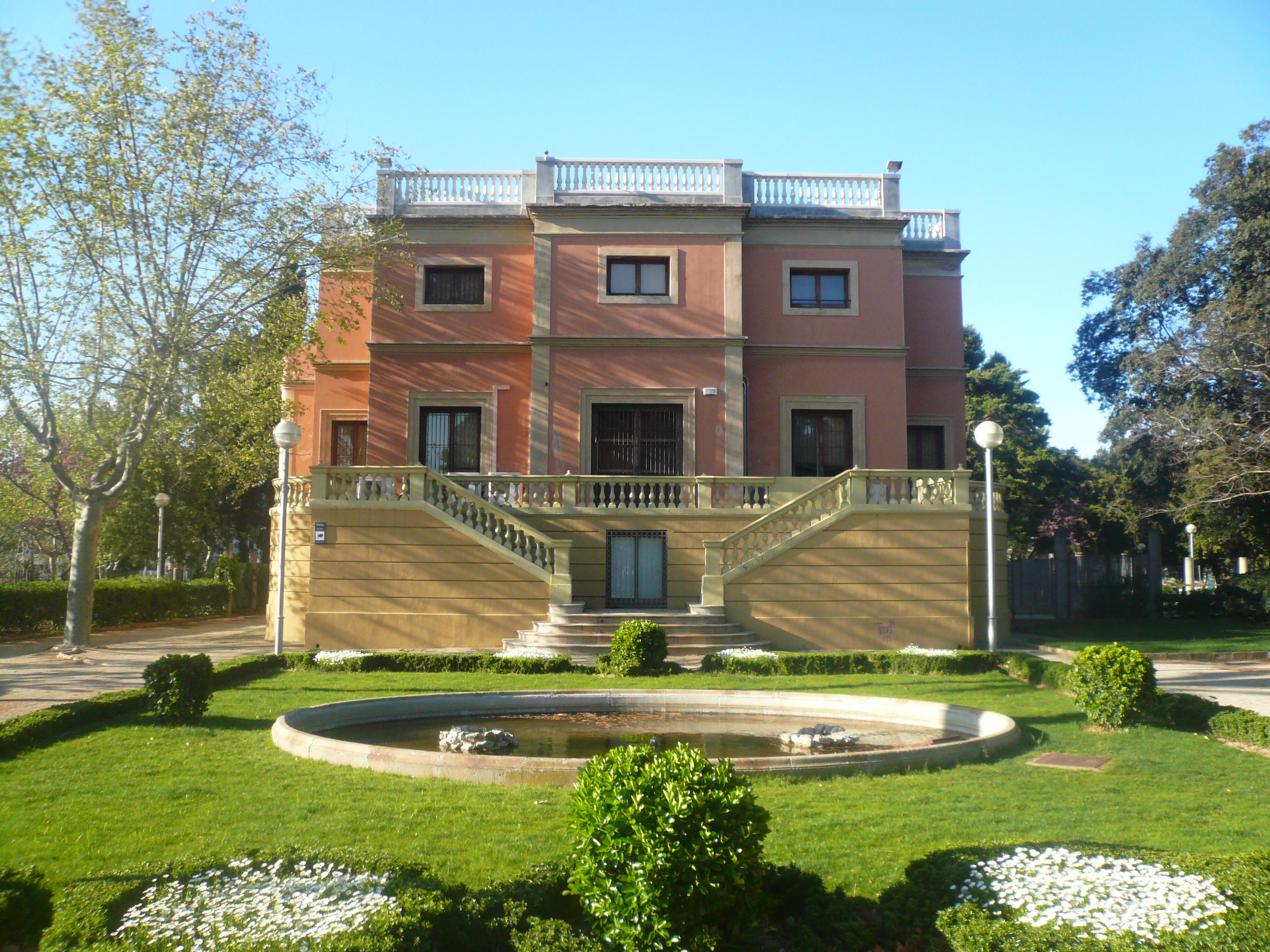 Escola municipal Vicenta Vives (Esplugues de Llobregat) Object location41° 22′ 33.59″ N, 2° 05′ 47.41″ E